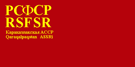 Vlag van de Karakalpakse AO tussen 1934 en 1937.